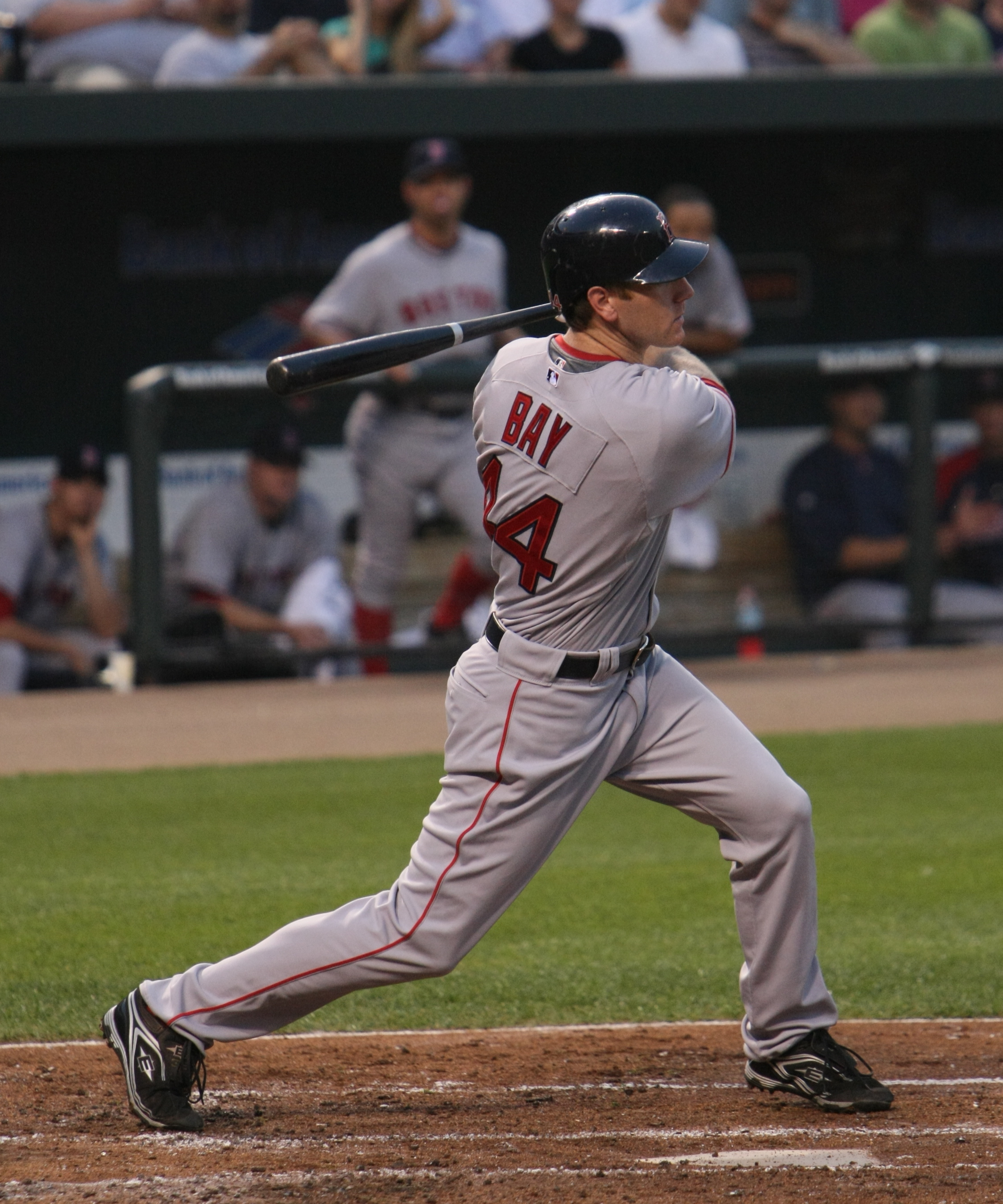 Jason Bay